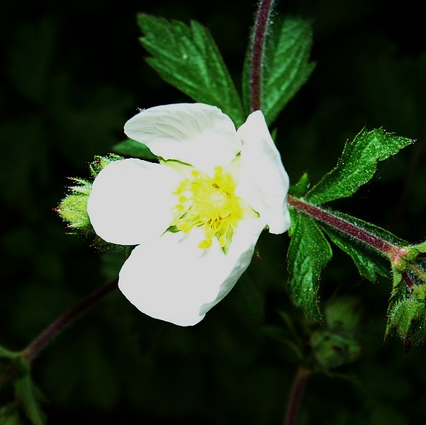 Drymocallis rupestris (syn. Potentilla rupestris)